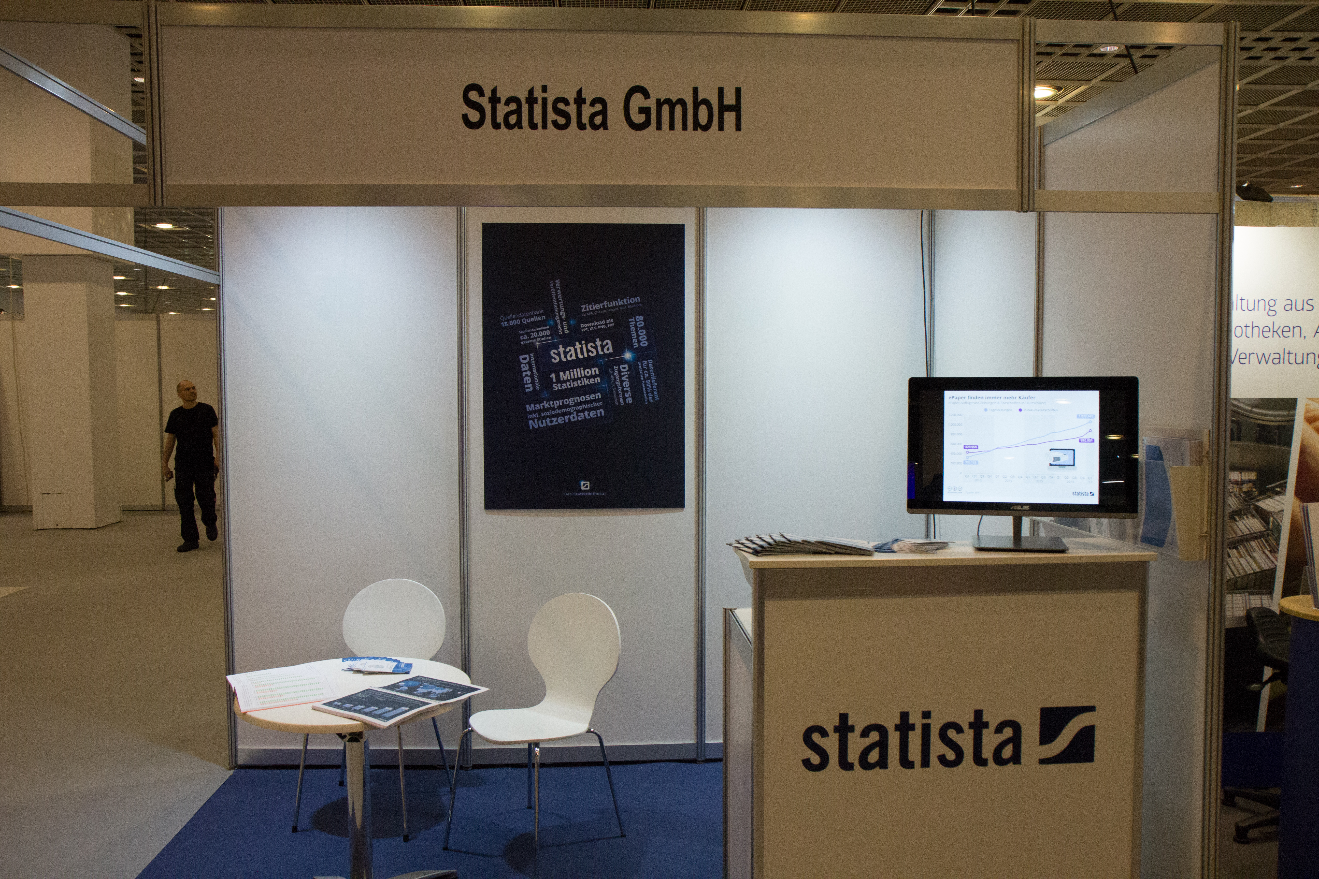 106. Deutscher Bibliothekartag in Frankfurt/Main